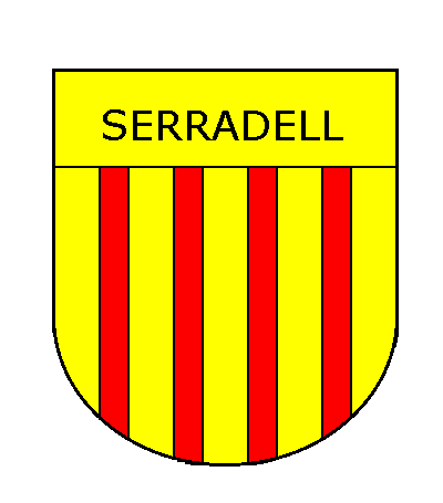 Escut de l'antic ajuntament, ara desaparegut, de Toralla i Serradell (Conca de Dalt, Pallars Jussà)